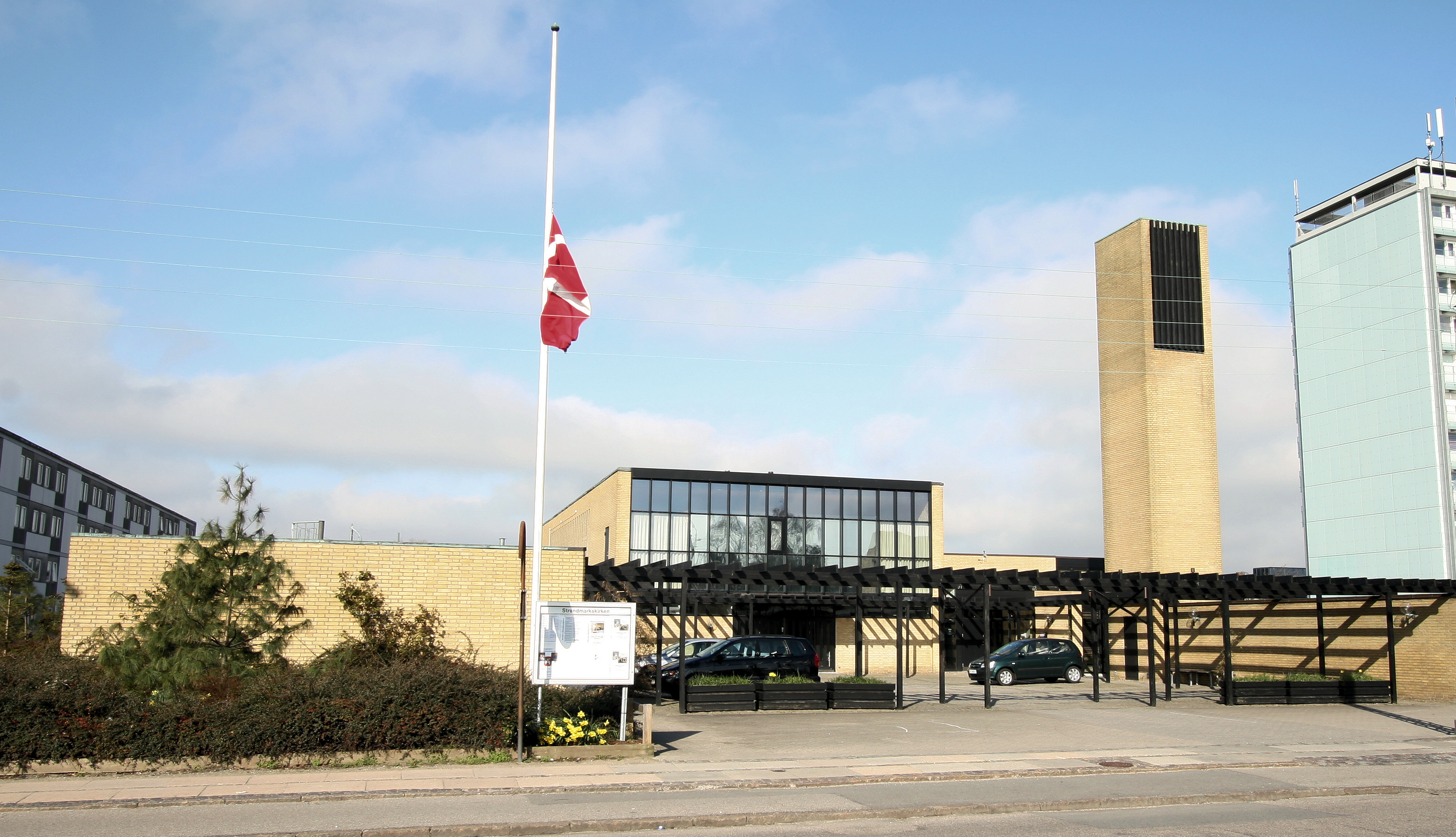 Strandmarkskirken, Hvidovre, Denmark.